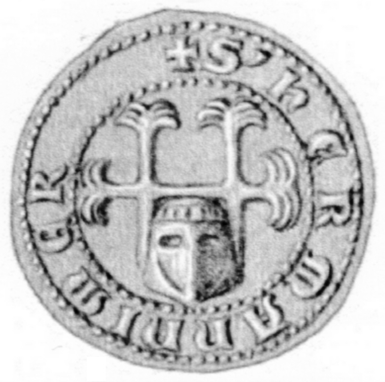 Siegel des Ritters Hermannus dictus Merzcel. Das Siegel stammt aus der Zeit um 1348.